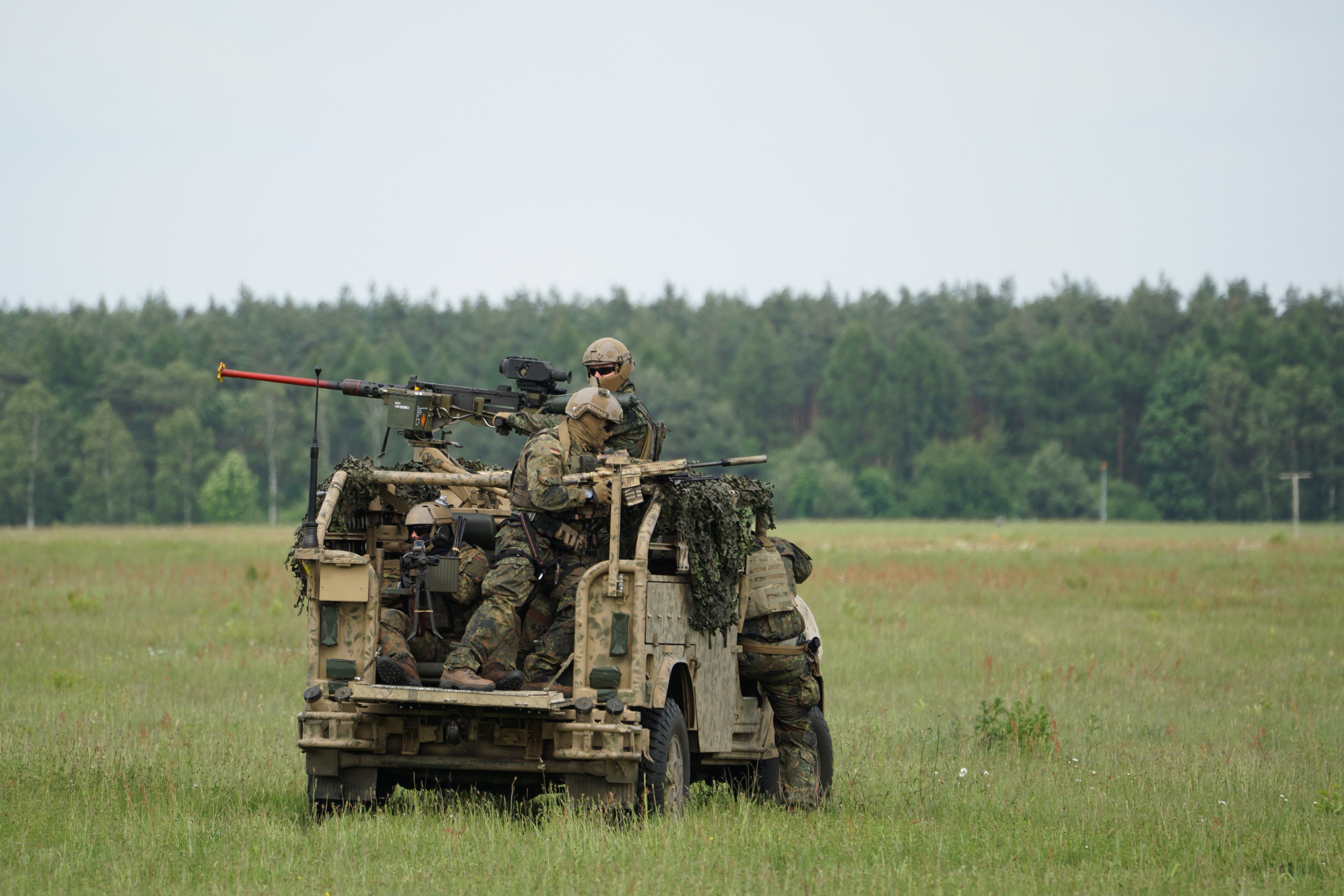 Aufgenommen am Tag der Bundeswehr 2017 auf dem Heeresflugplatz Faßberg.